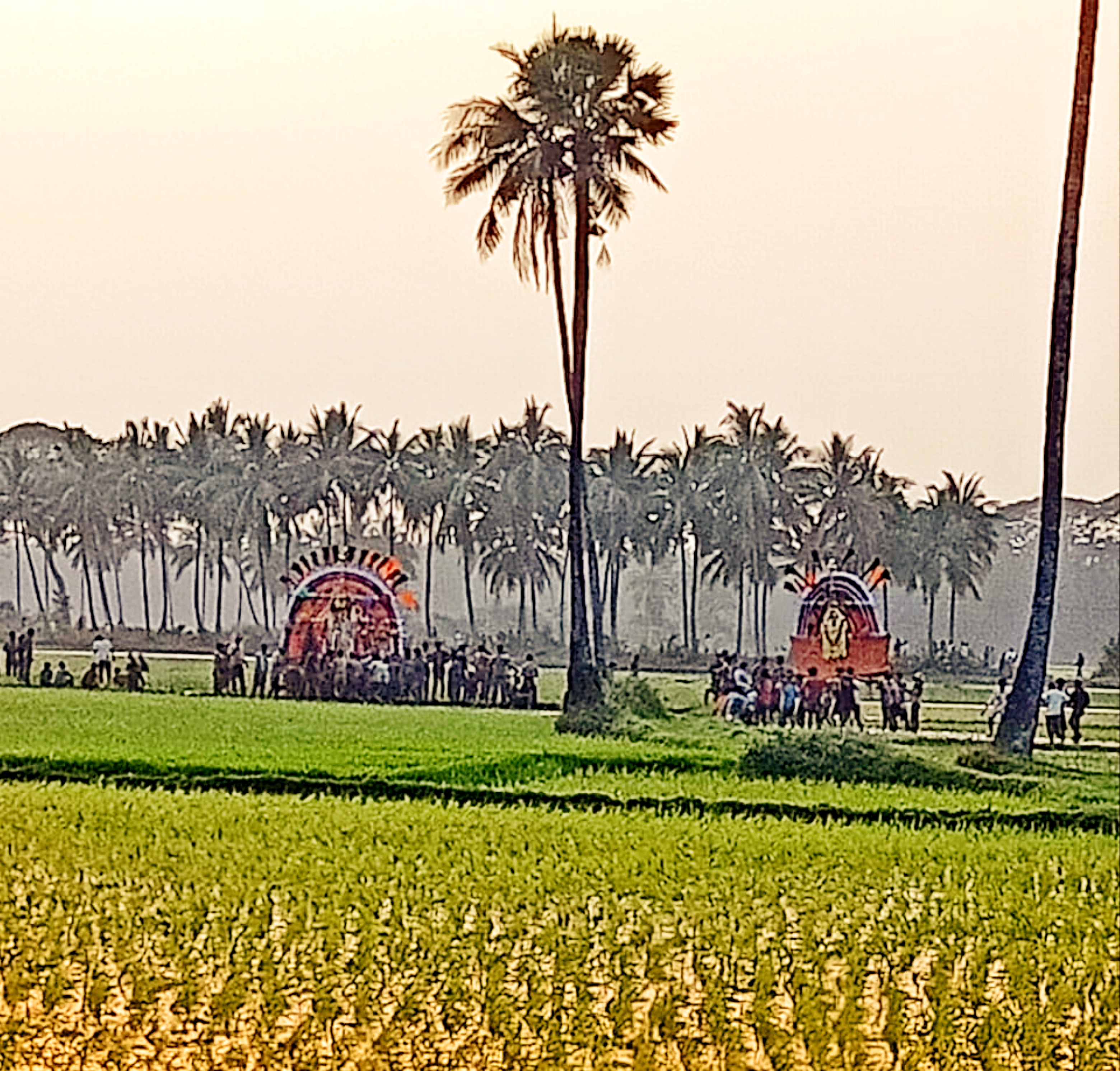 జగ్గన్నతోట ప్రభల తీర్థం పంట పోలల్లో ప్రభను తీసుకోస్తున్నా చిత్రం